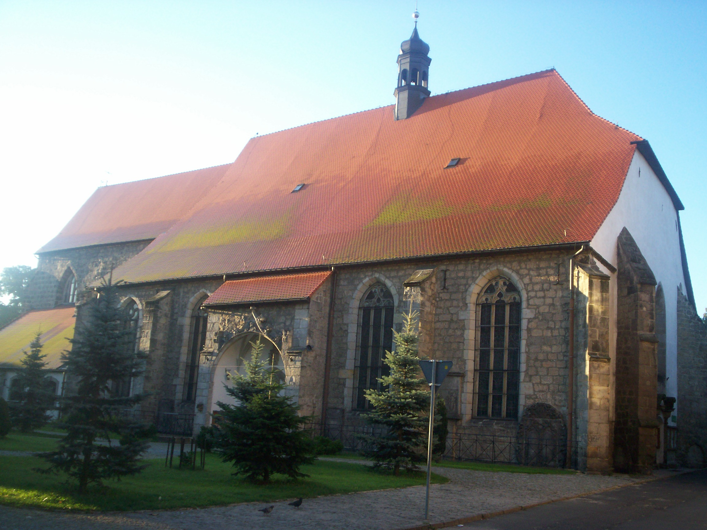 Kościół Franciszkański we Lwówku Ślaskim